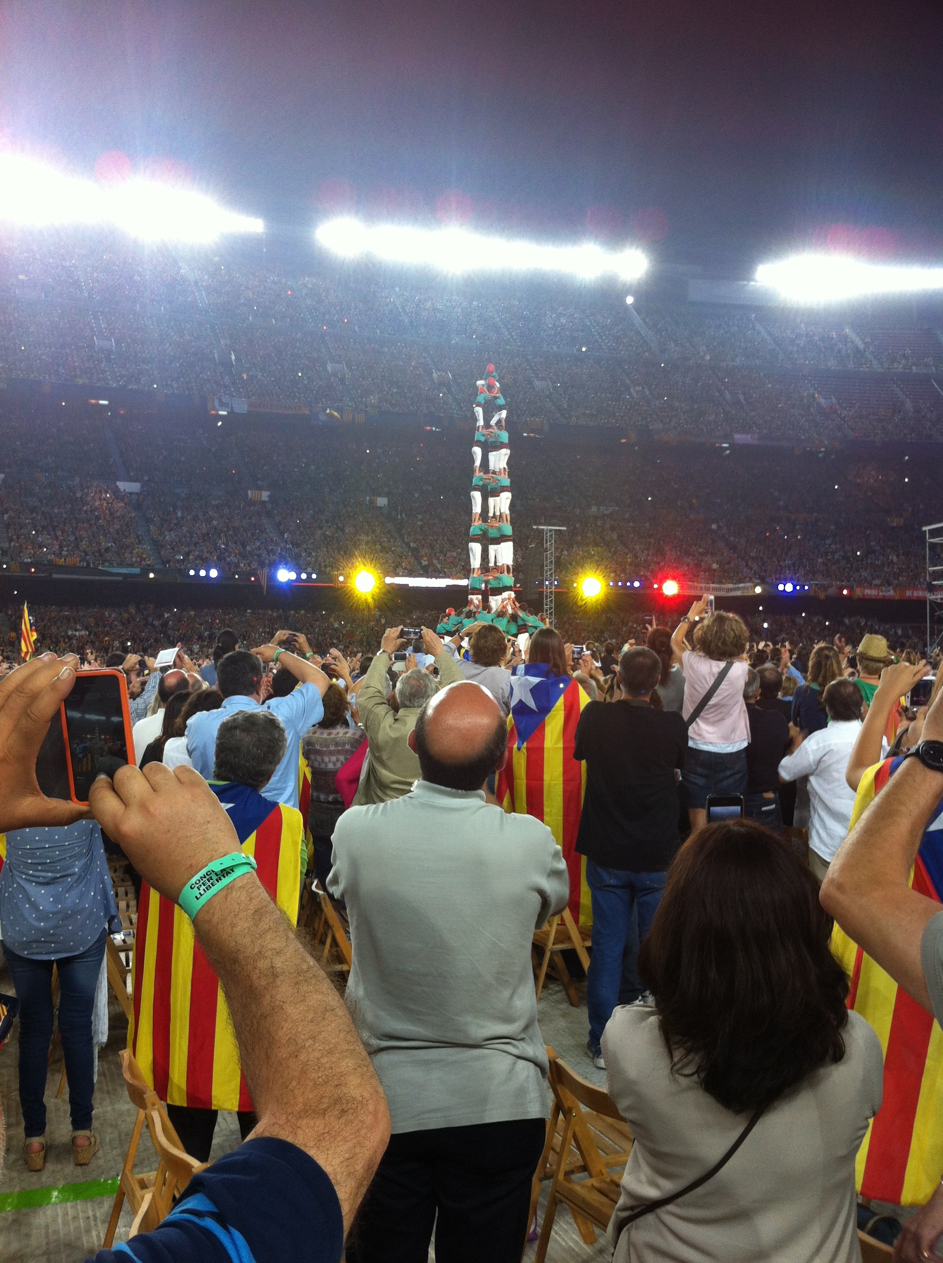 Actuació dels Castellers de Vilafranca